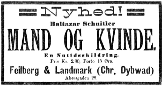 Avertissement for Balthazar Schnitlers "Mand og Kvinde". Her efter Aftenposten 8.5.1897